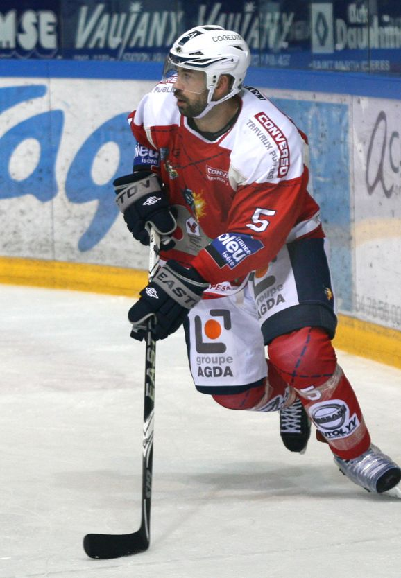 Baptiste Amar le 25/10/2011 lors du match de Coupe de France face à Chamonix (victoire de Grenoble 4-1)